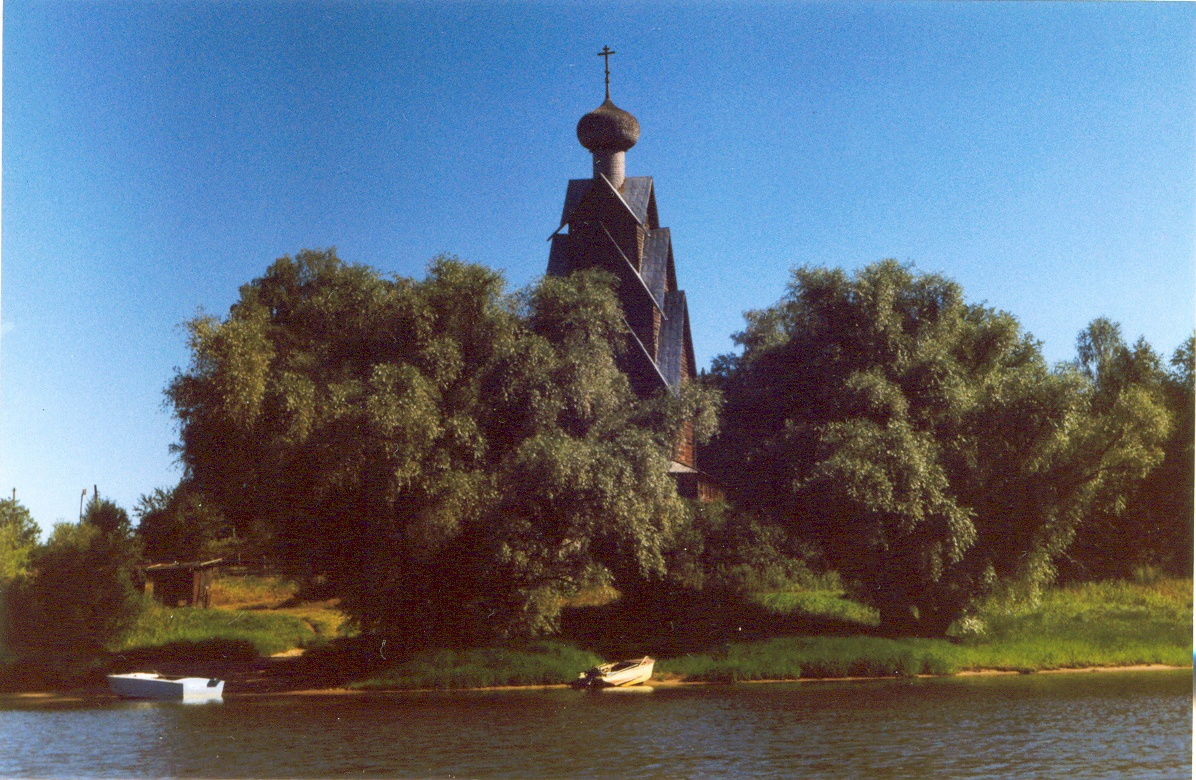 Церковь Иоанна Предтечи (деревянная) (Тверская область, Осташков, деревня Ширково (Ширков Погост))